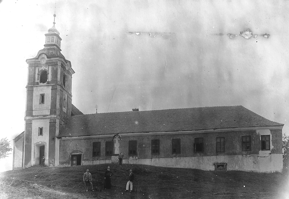 Монастир в Імстичеві - 1930-і рр.